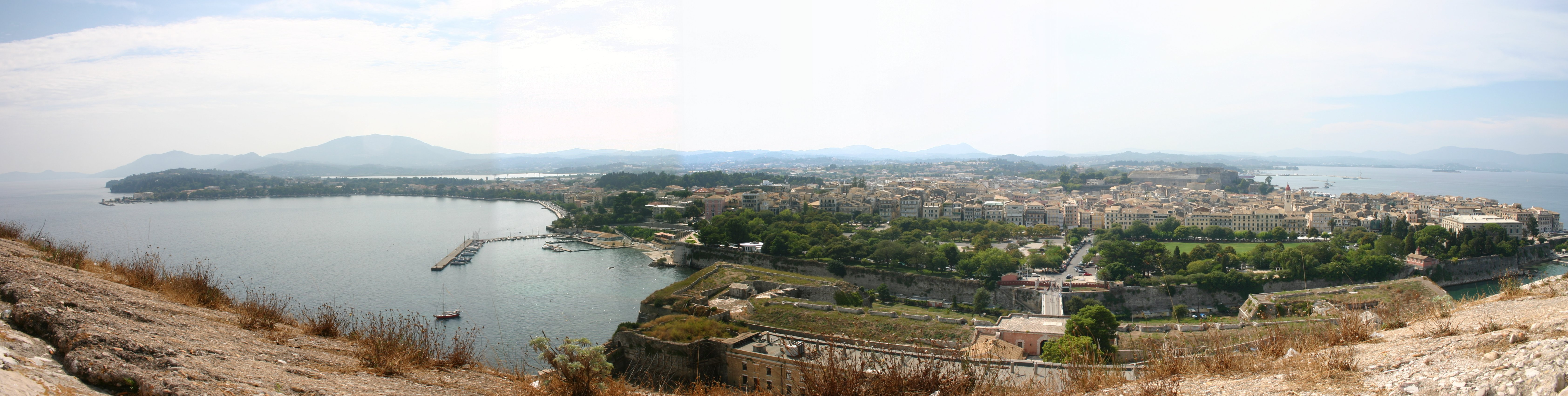 Korfu, von der Alten Festung (Palaió Froúrio) auf die Altstadt und die Neue Festung. Vorne die Spianada